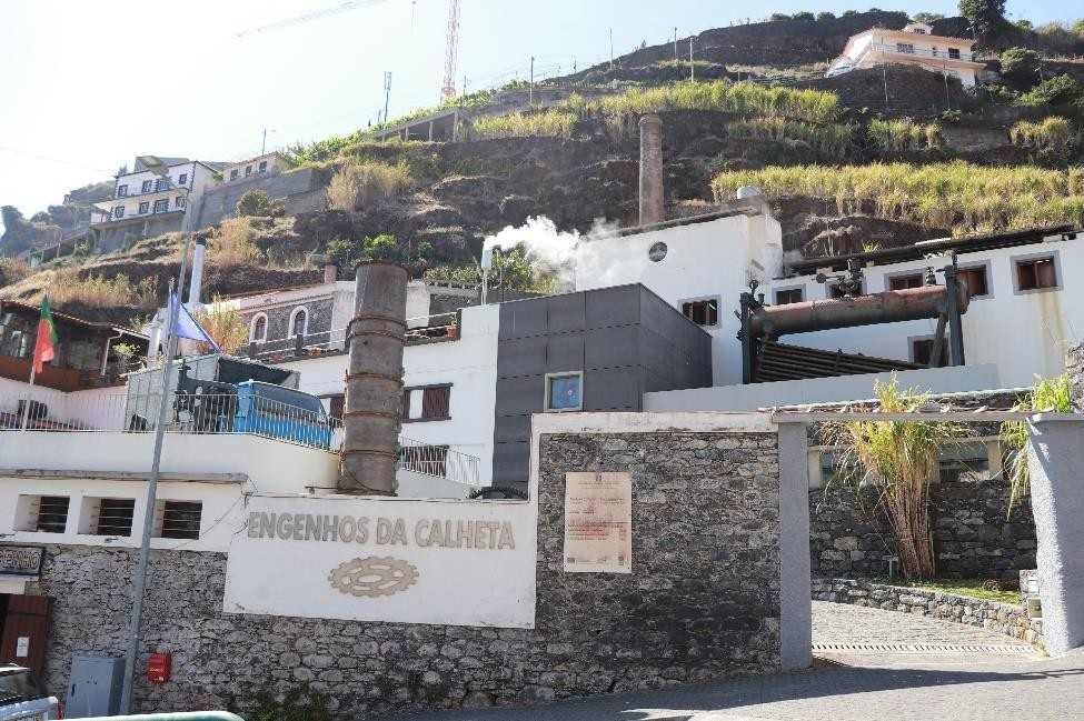 Parte frontal do Engenho da Calheta